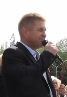 Выступление "народного" мэра Славянска Вячеслава Пономарёва на праздничном митинге 9 мая 2014. На заднем плане предыдущий мэр Славянска Неля Штепа.